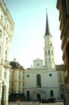 Michael